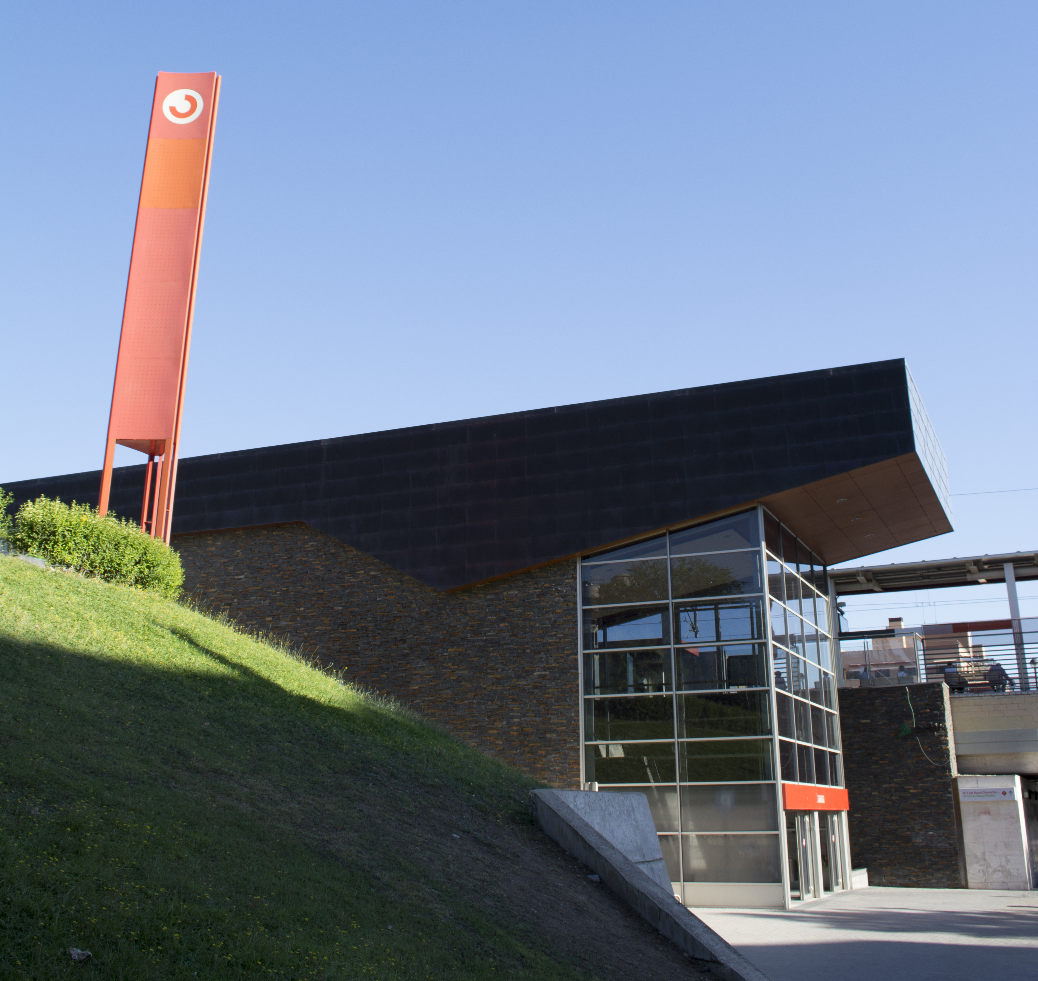 Exterior de la estación de tren de Aravaca.